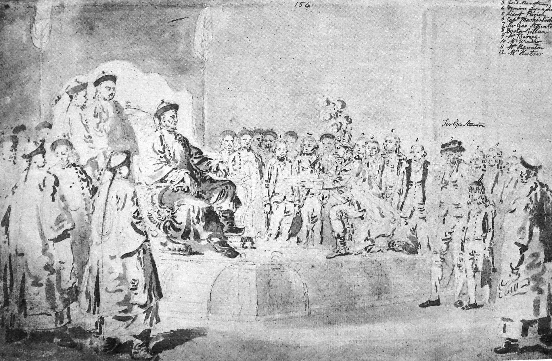 ציור סיני של הקיסר צ'ייאנלונג בסוכנות הבריטית בסין של לורד מקרטני